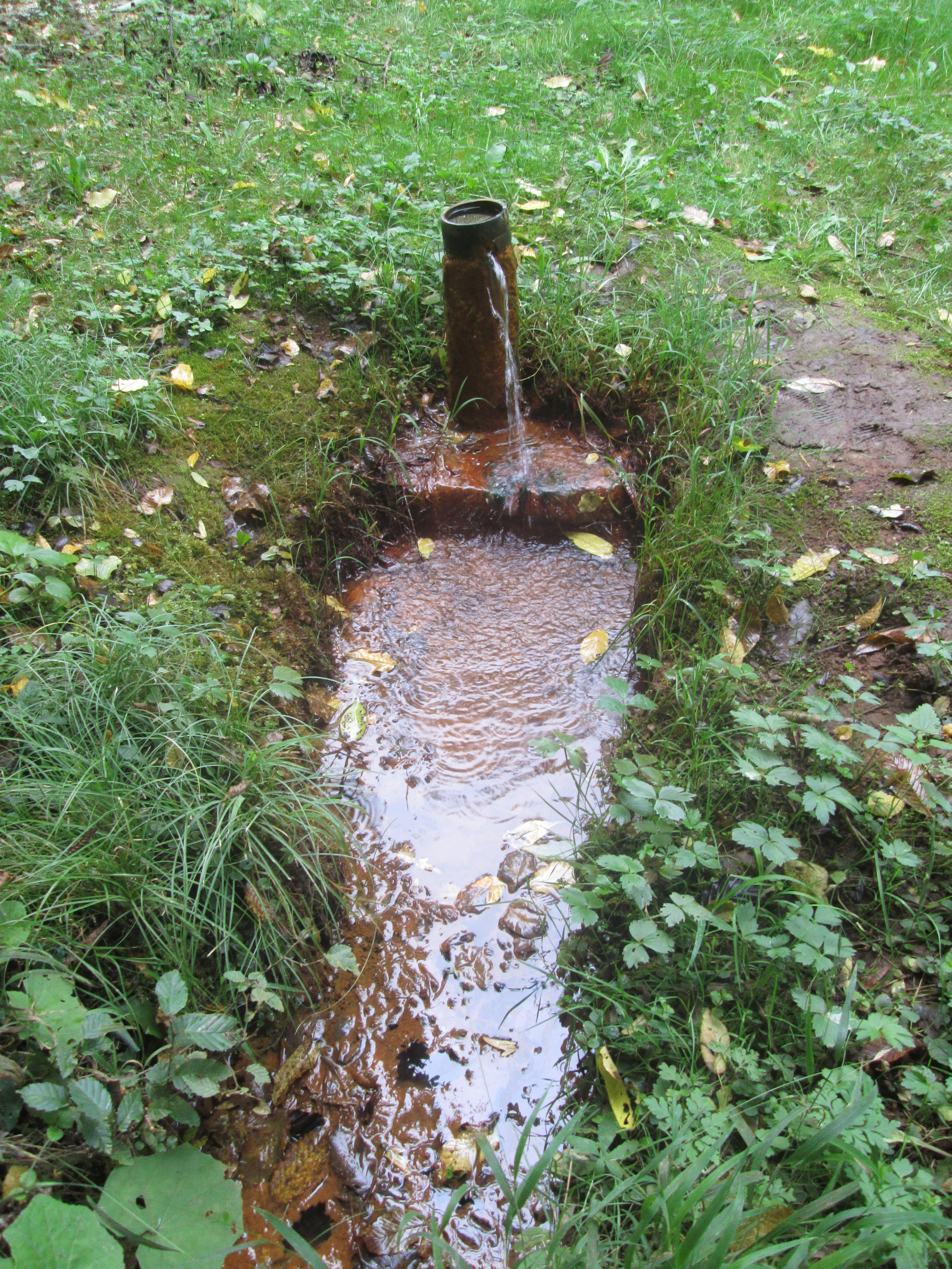 Српски (ћирилица): Други извор Саставци у Мирашевачкој бањи